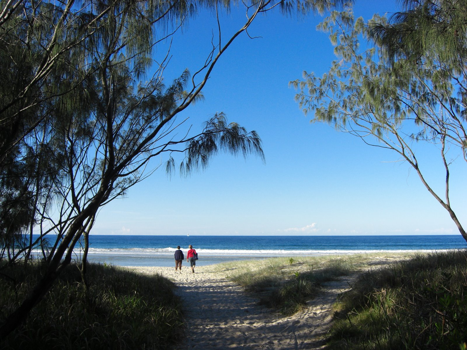 La plage à Kingscliff, petite ville à la limite de NSW et du Queensland.